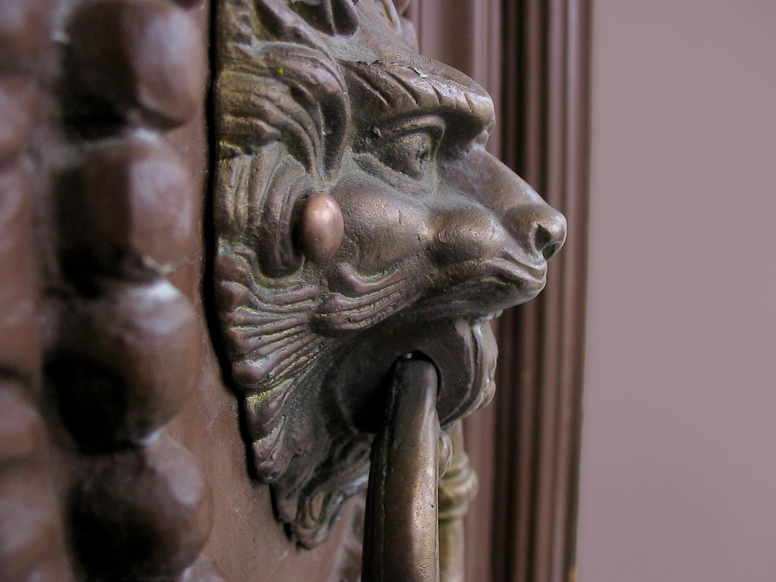 Aldaba con forma de león a door knocker in the palace in Przytok, Poland